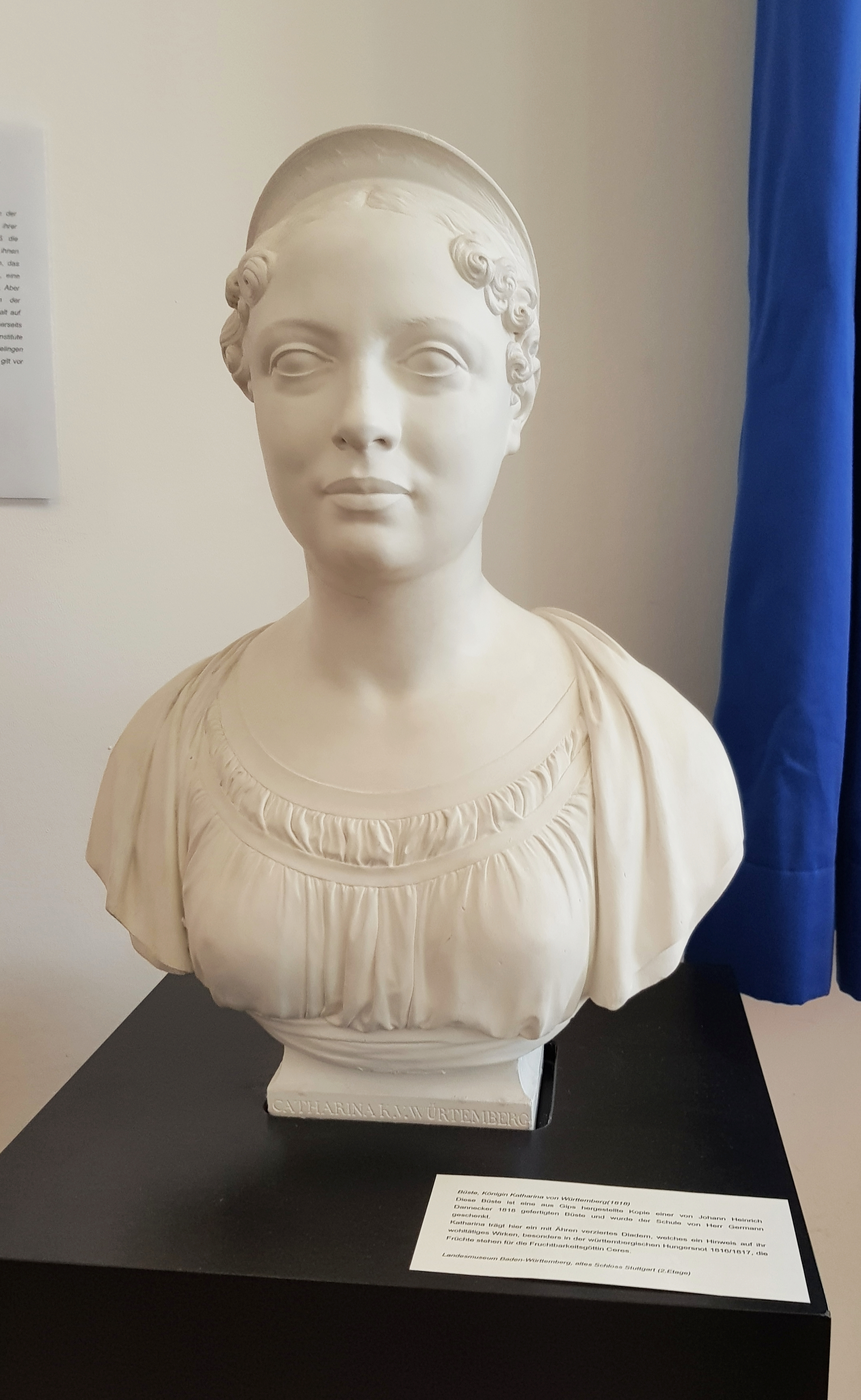 Büste der Königin Katharina von Württemberg, im Besitz des Königin-Katharina-Stiftes. Kopie der Marmorbüste von Johann Heinrich Dannecker, die sich in der Grabkapelle auf dem Württemberg befindet.